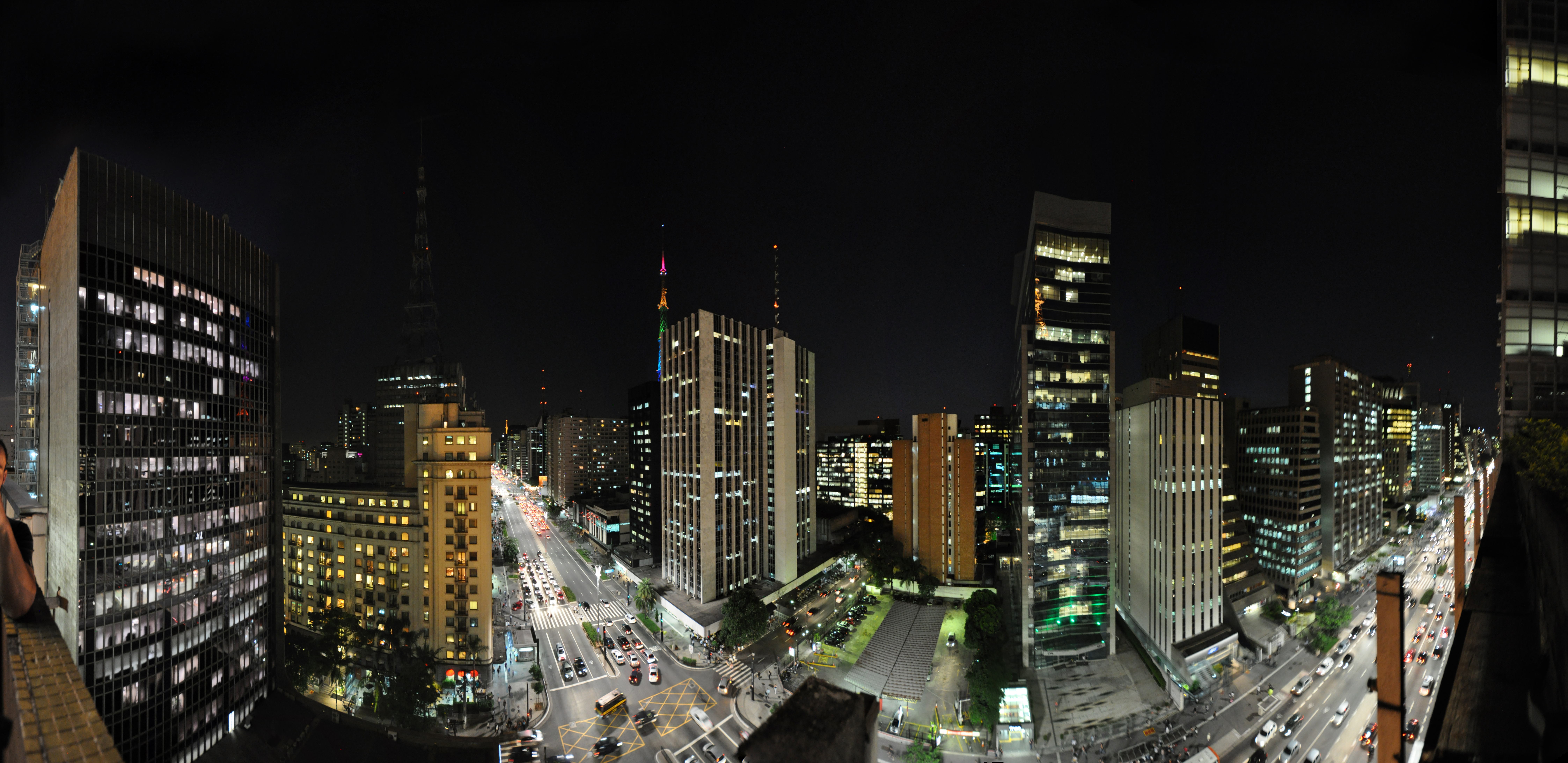 Vista panorâmica da Avenida Paulista a partir do edifício da Gazeta, em São Paulo, Brasil.